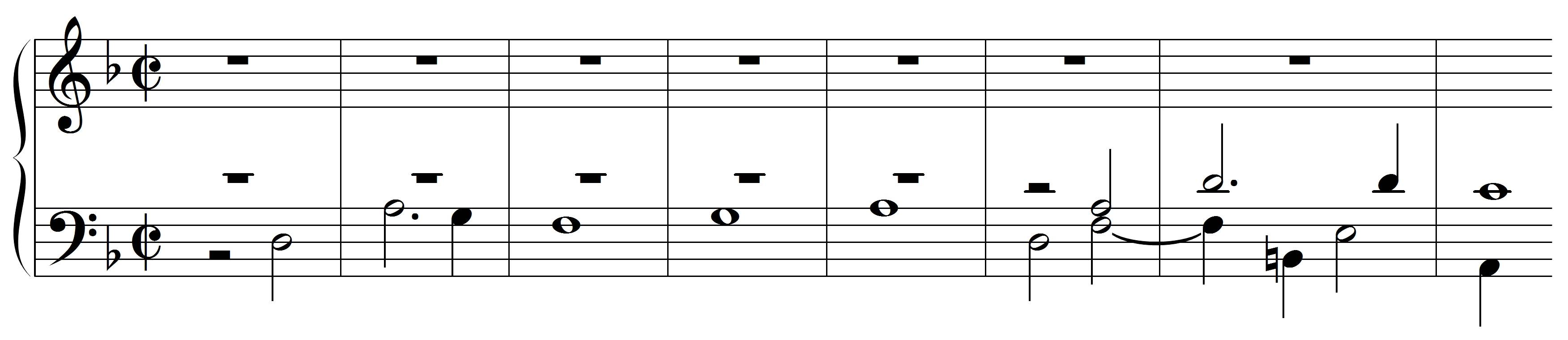 Bach, JS, Incipit Contrapunctus 19, BWV 1080